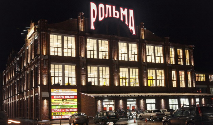 ТЦ вечером выглядит потрясающе! Спасибо тем кто восстановил часть фабрики и построил торговый центр!